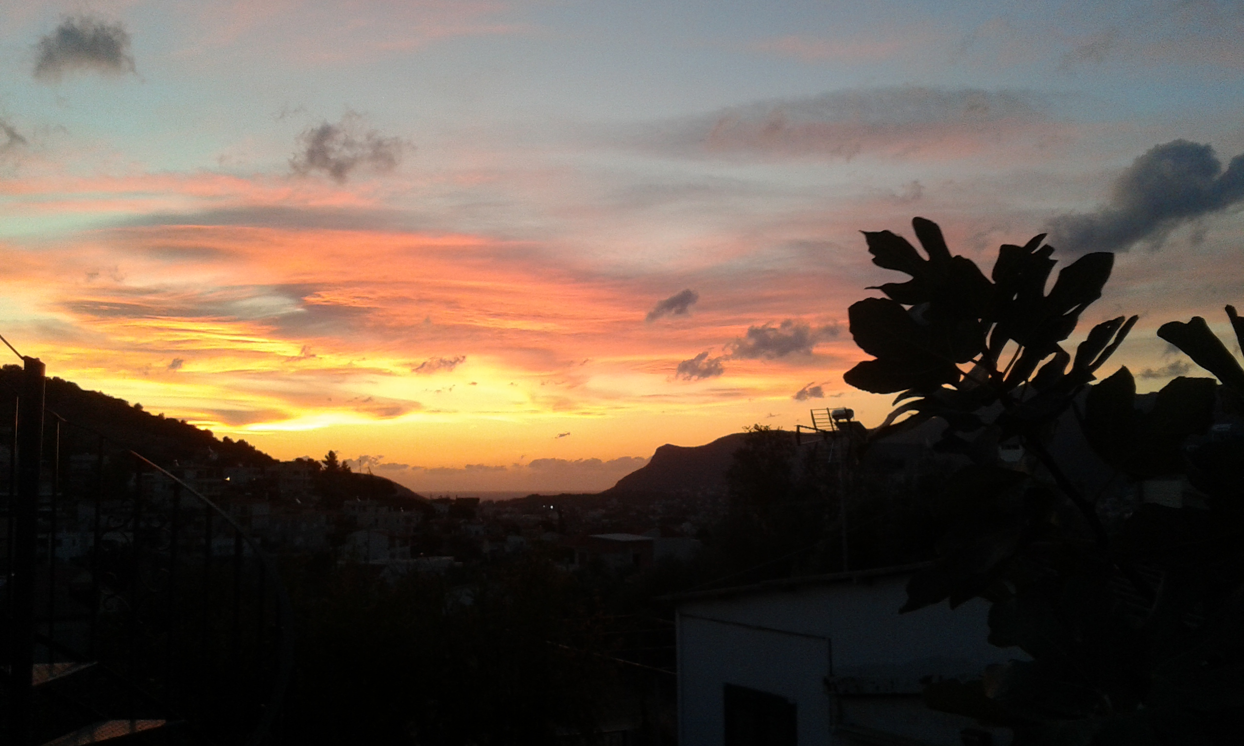 Ανατολή στο Πόρτο Ράφτη, Οκτώβριος 2017